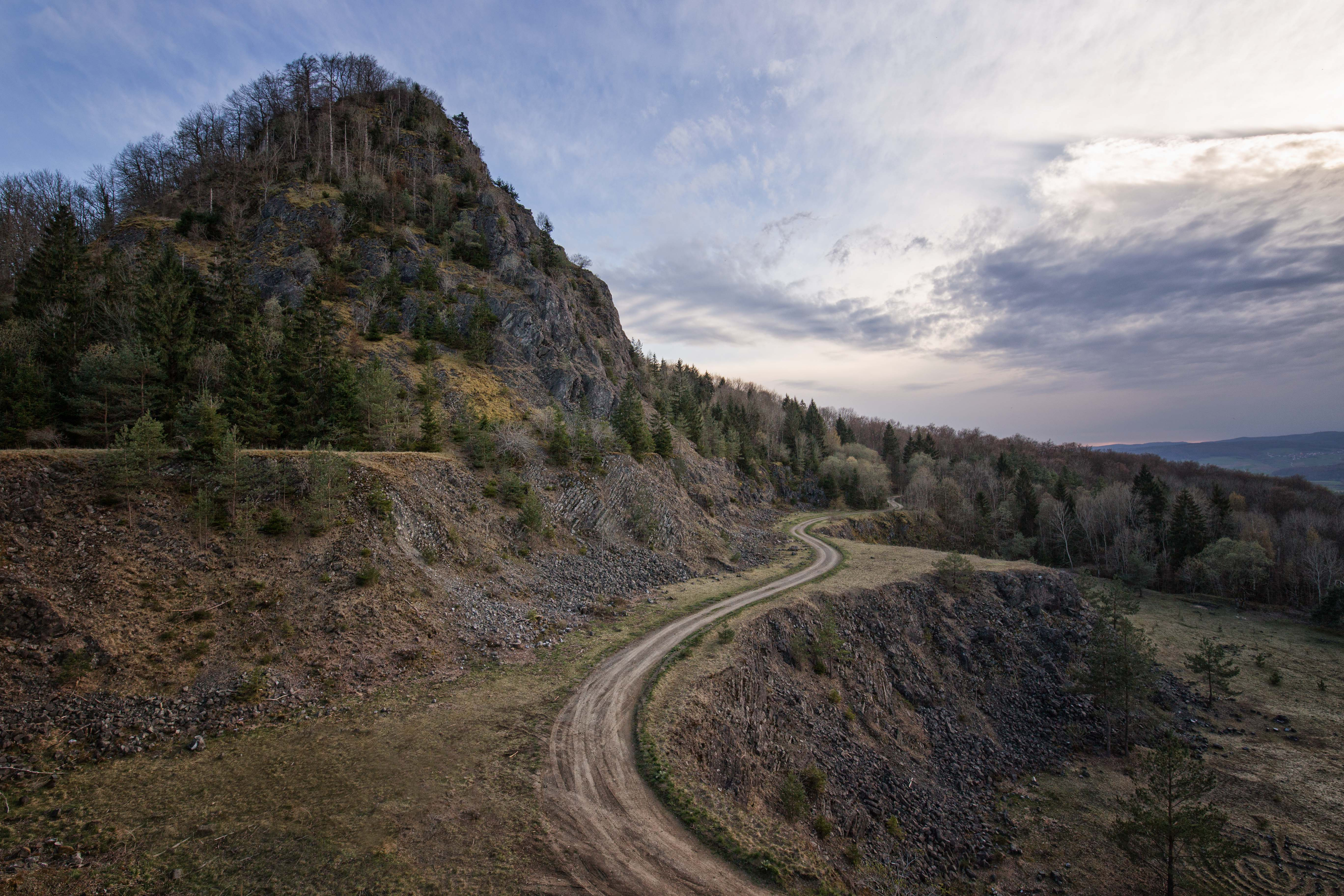 Steinbruch Abbautrassen unterhalb des Gipfels vom Hohenstoffeln